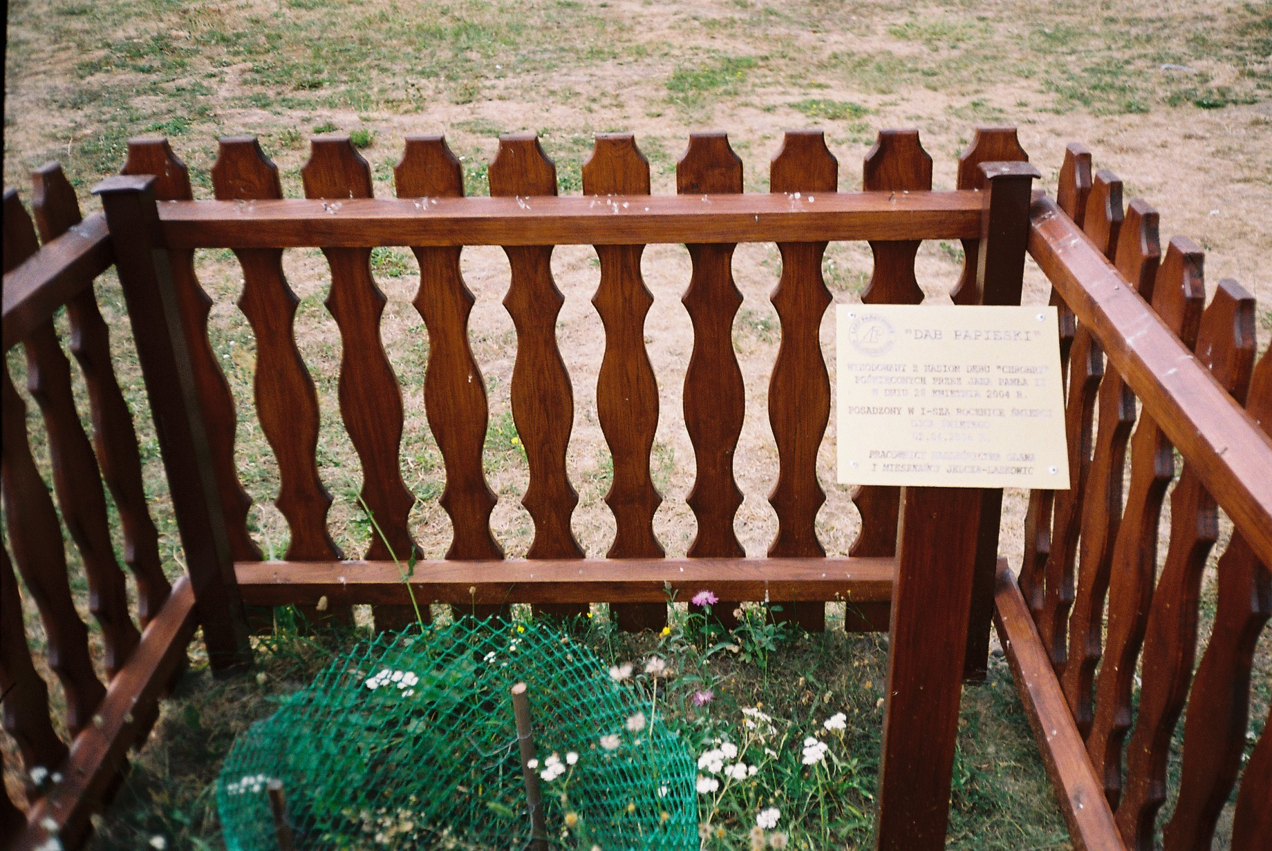 Jelcz-Laskowice - pozostałość po dębie papieskim